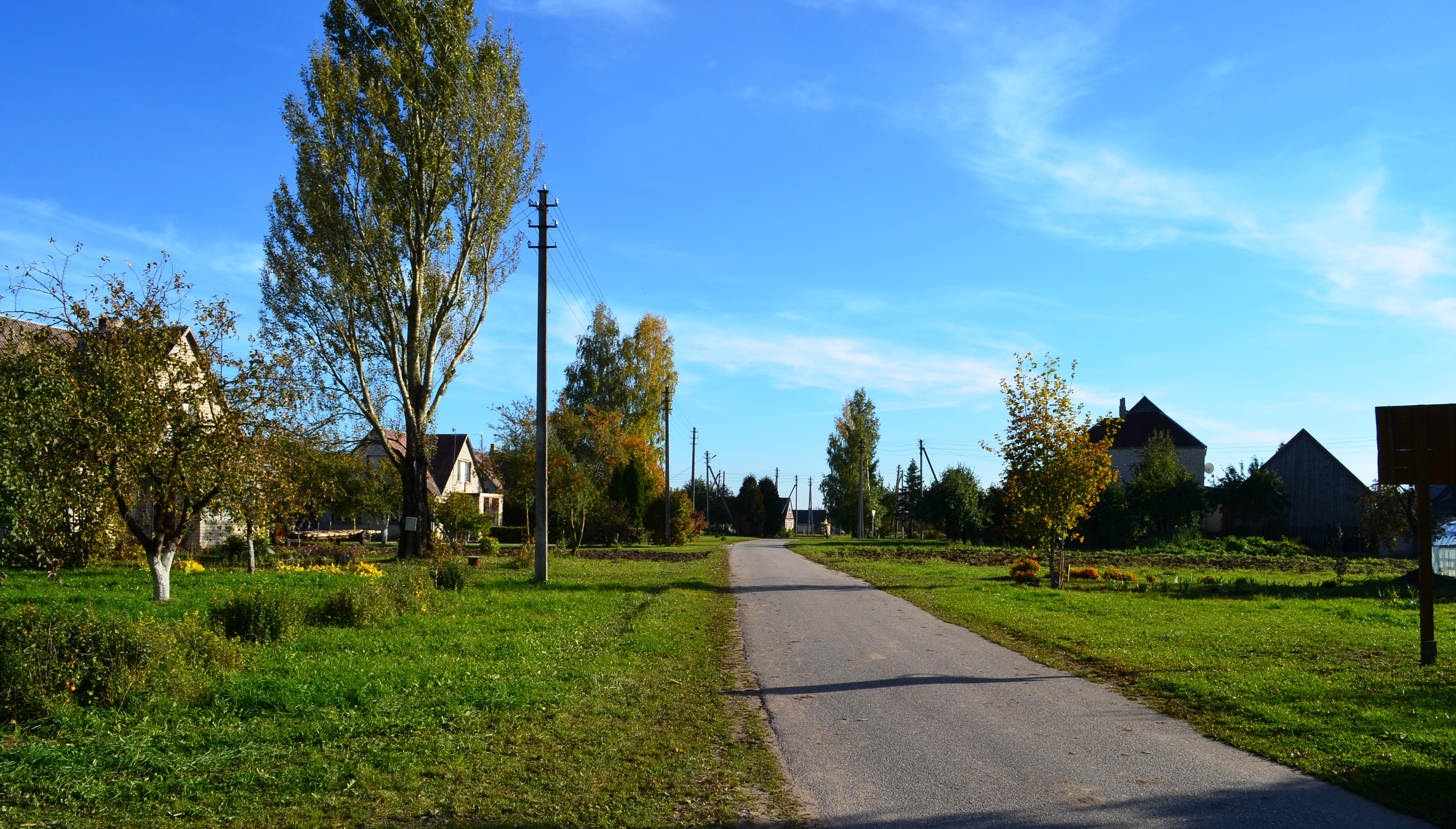 Vikaičiai, Gudžiūnų sen., Kėdainių raj.